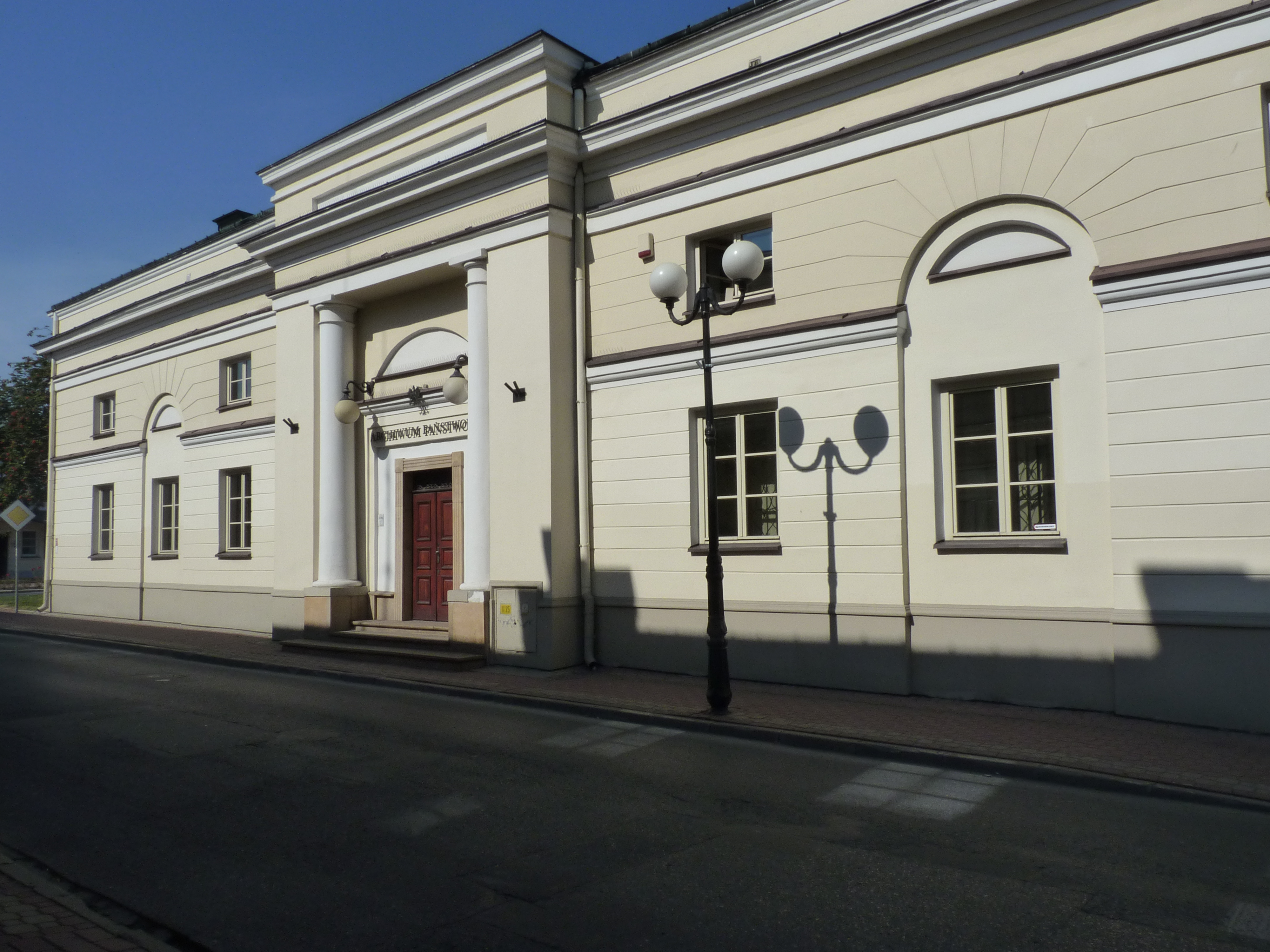 Siedlce, ul. Kościuszki - dawne stajnie w zespole pałacowo-parkowym, obecnie Archiwum Państwowe (wrzesień 2012), widok na wejście (zabytek nr A-37/193)